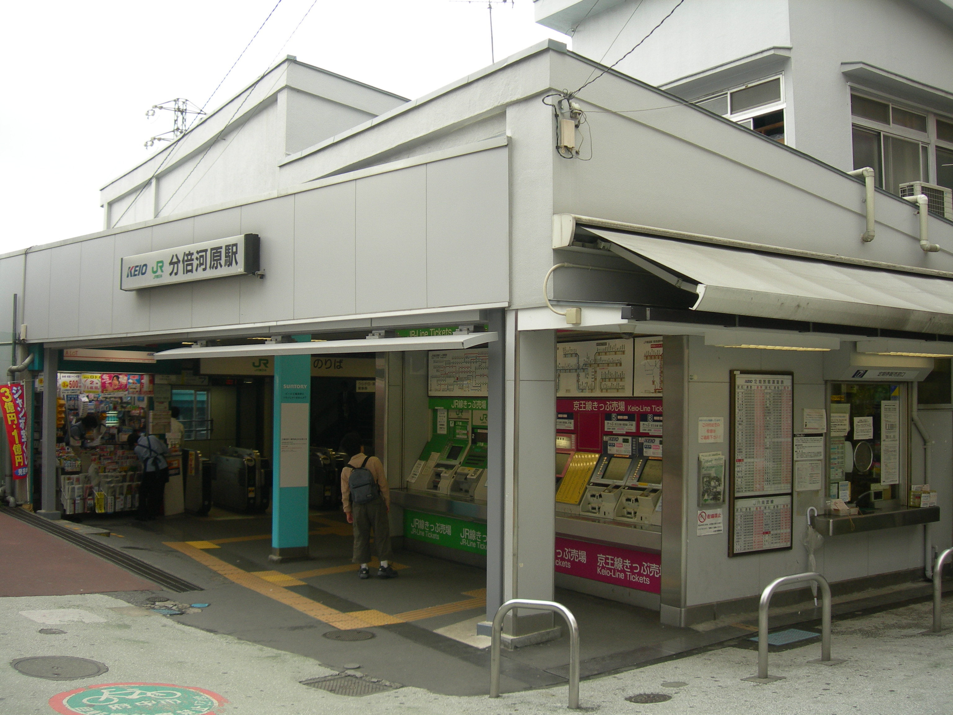 分倍河原駅